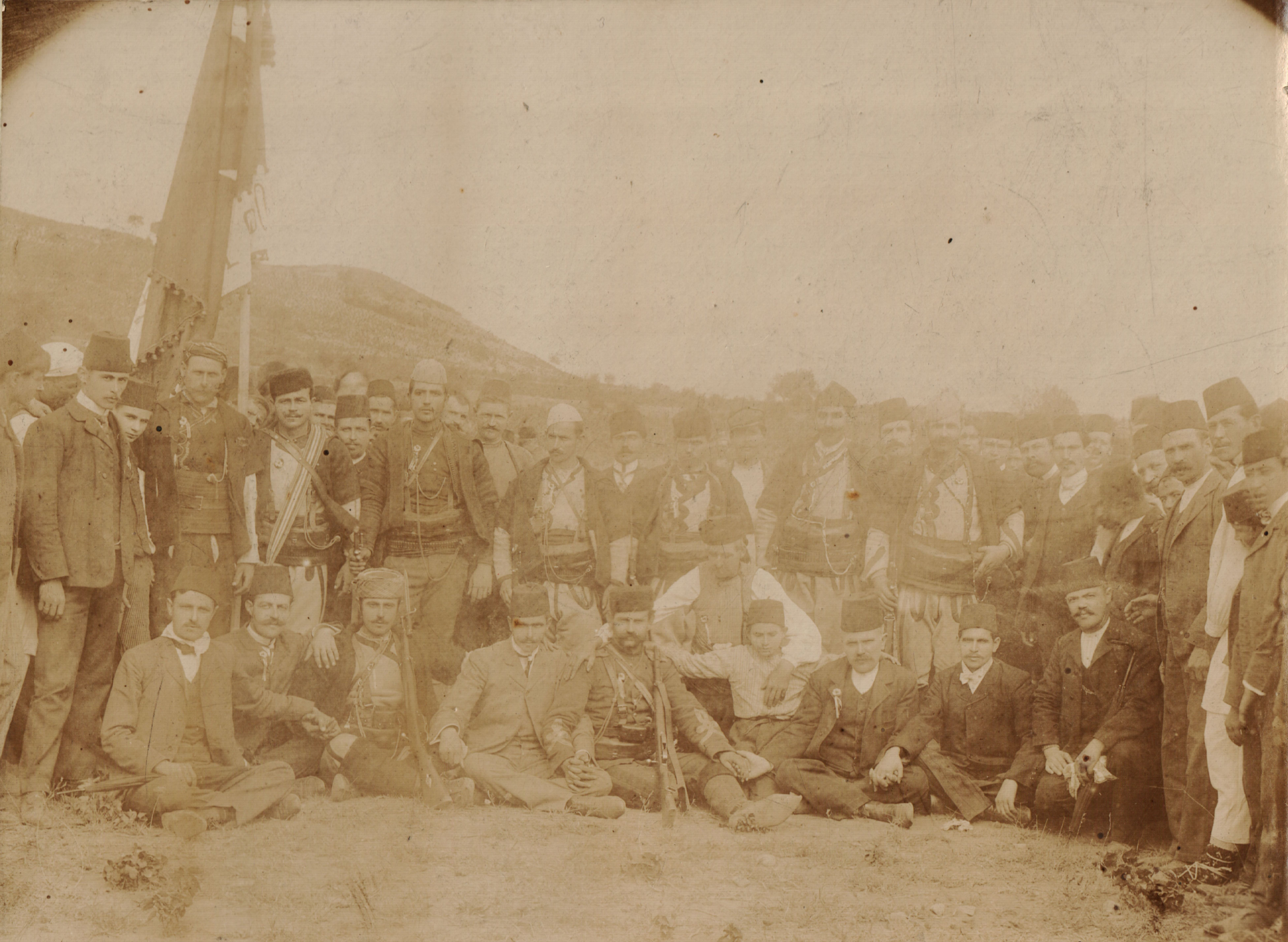 Снимка на четата на Васил Аджаларски (Скопска)